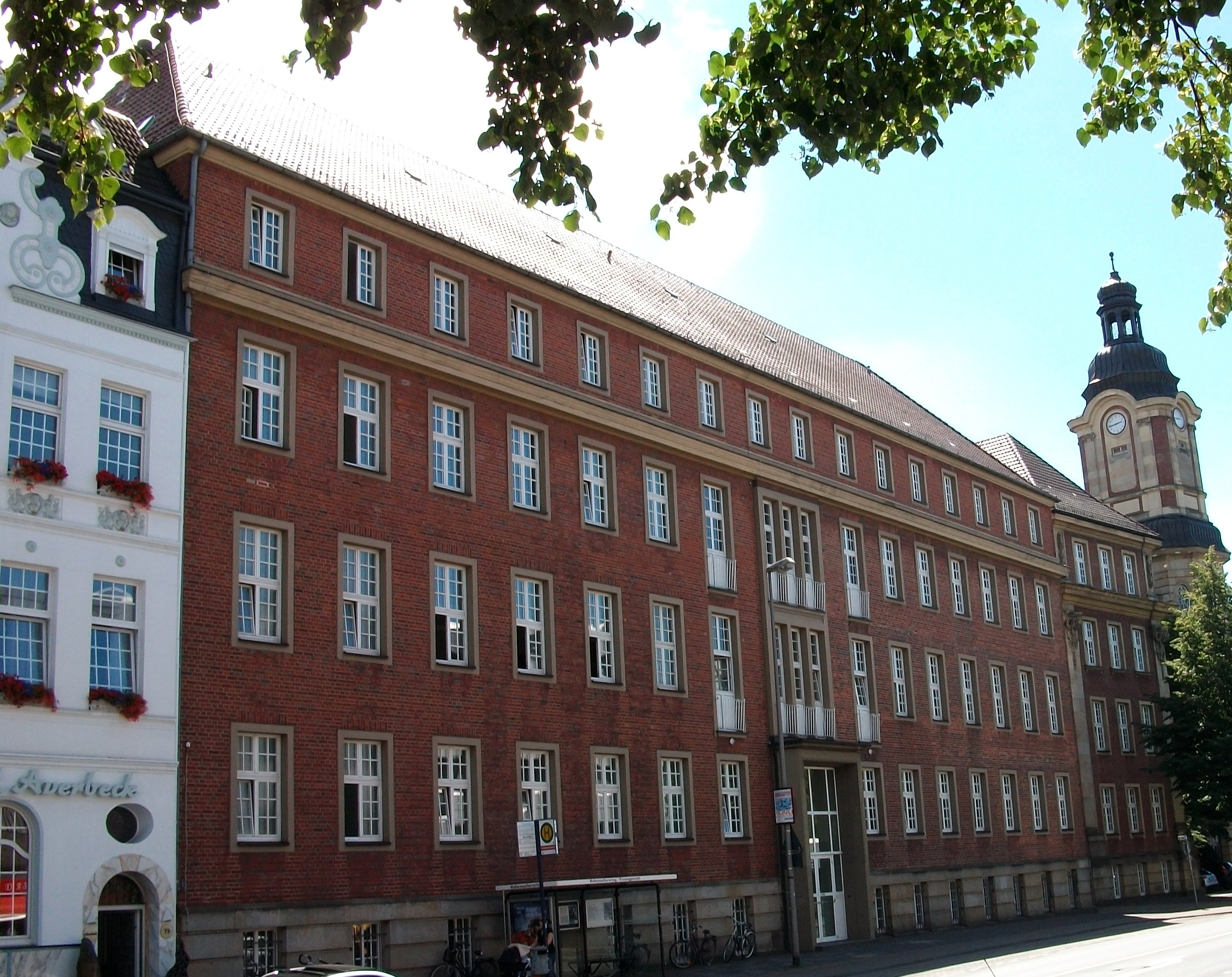 Finanzgericht in Münster (Germany).